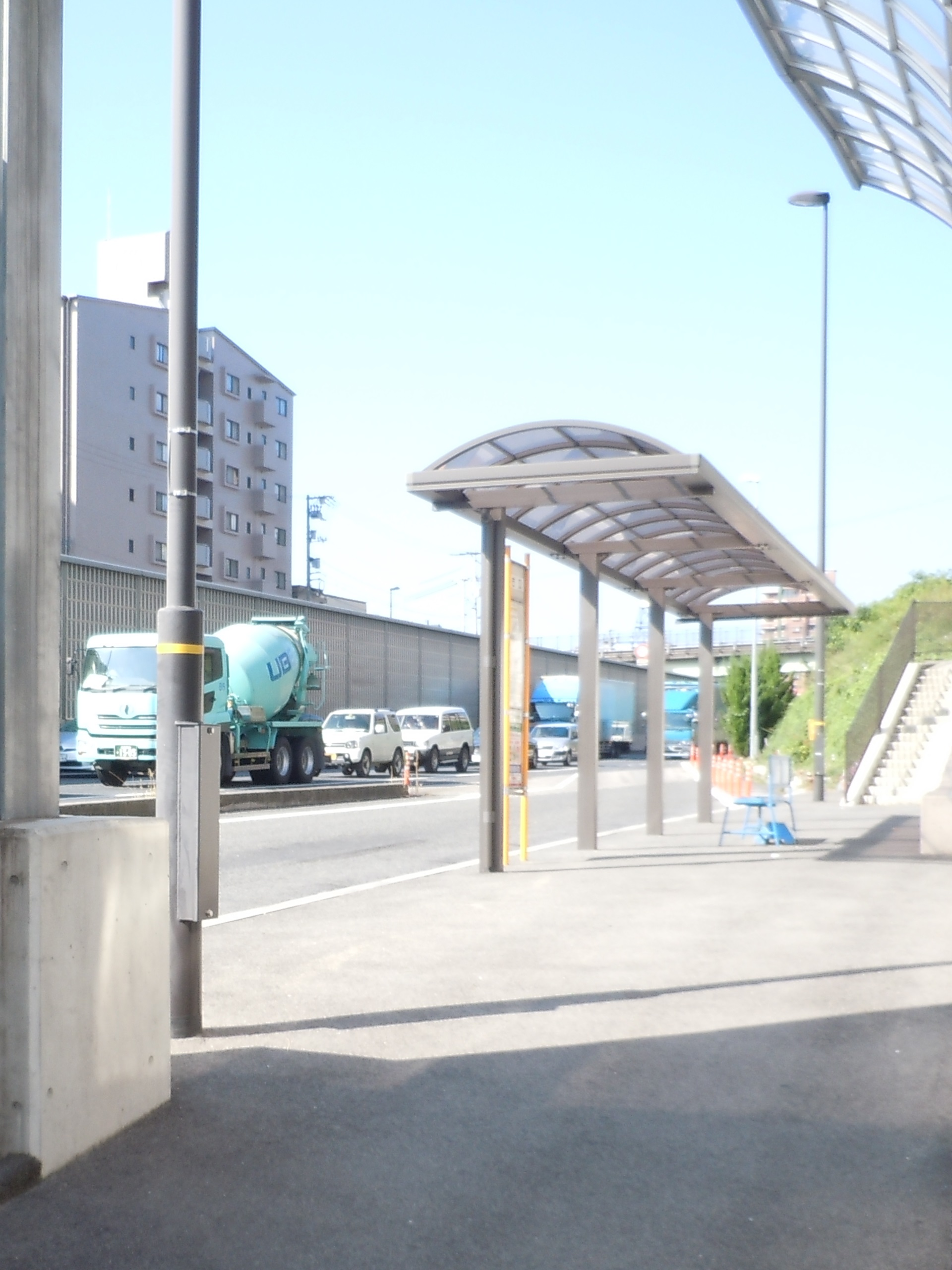 古江バスストップ (上り) を東を背に撮影。